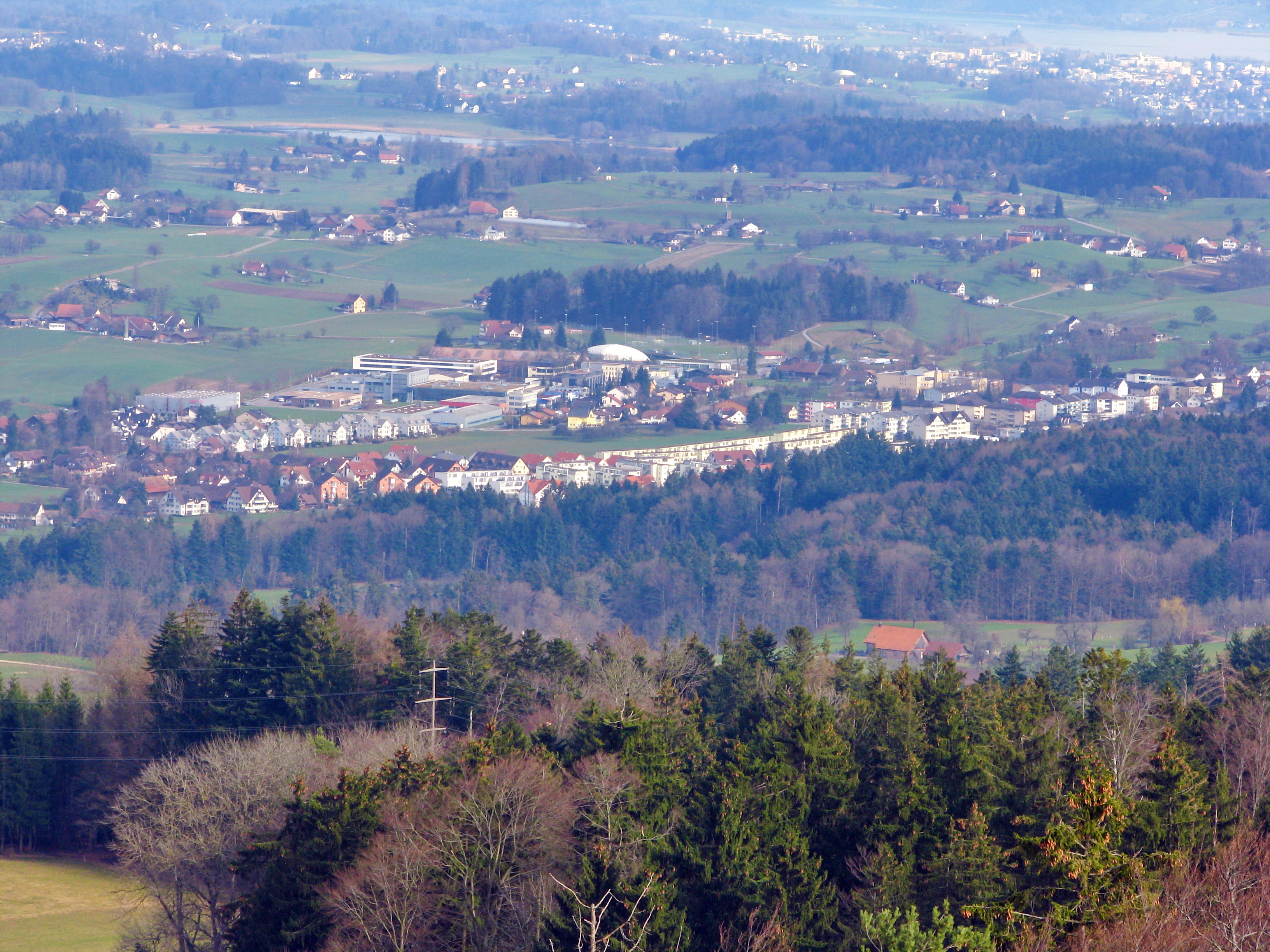 Esslingen (Switzerland), as seen from Pfannenstiel Aussichtsturm, Rapperswil-Jona in the background.